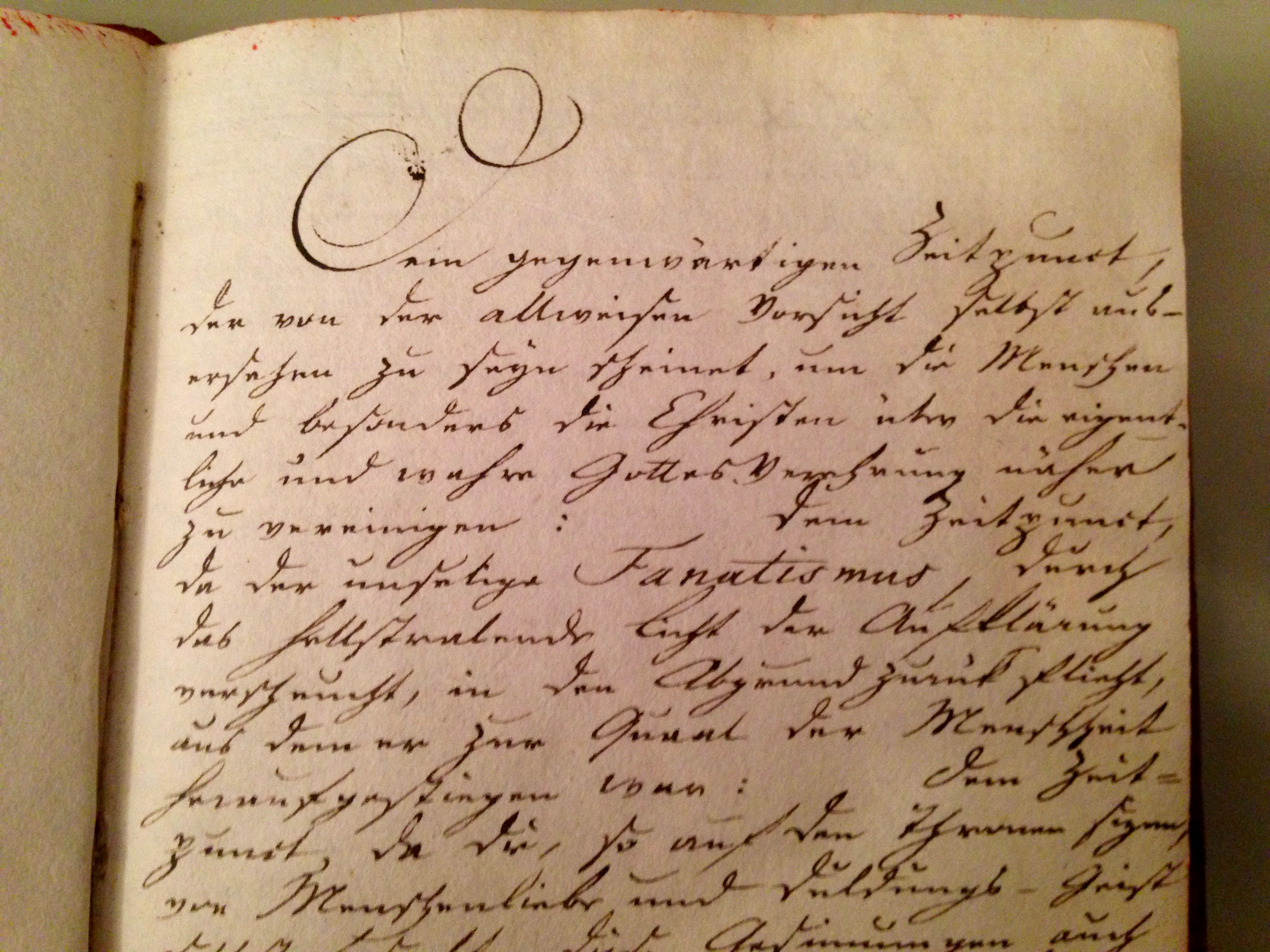 Auszug aus einem von drei Kollektenbüchern für den Kirchbau 1787 (Archiv der Evangelischen Kirchengemeinde Monschauer Land)